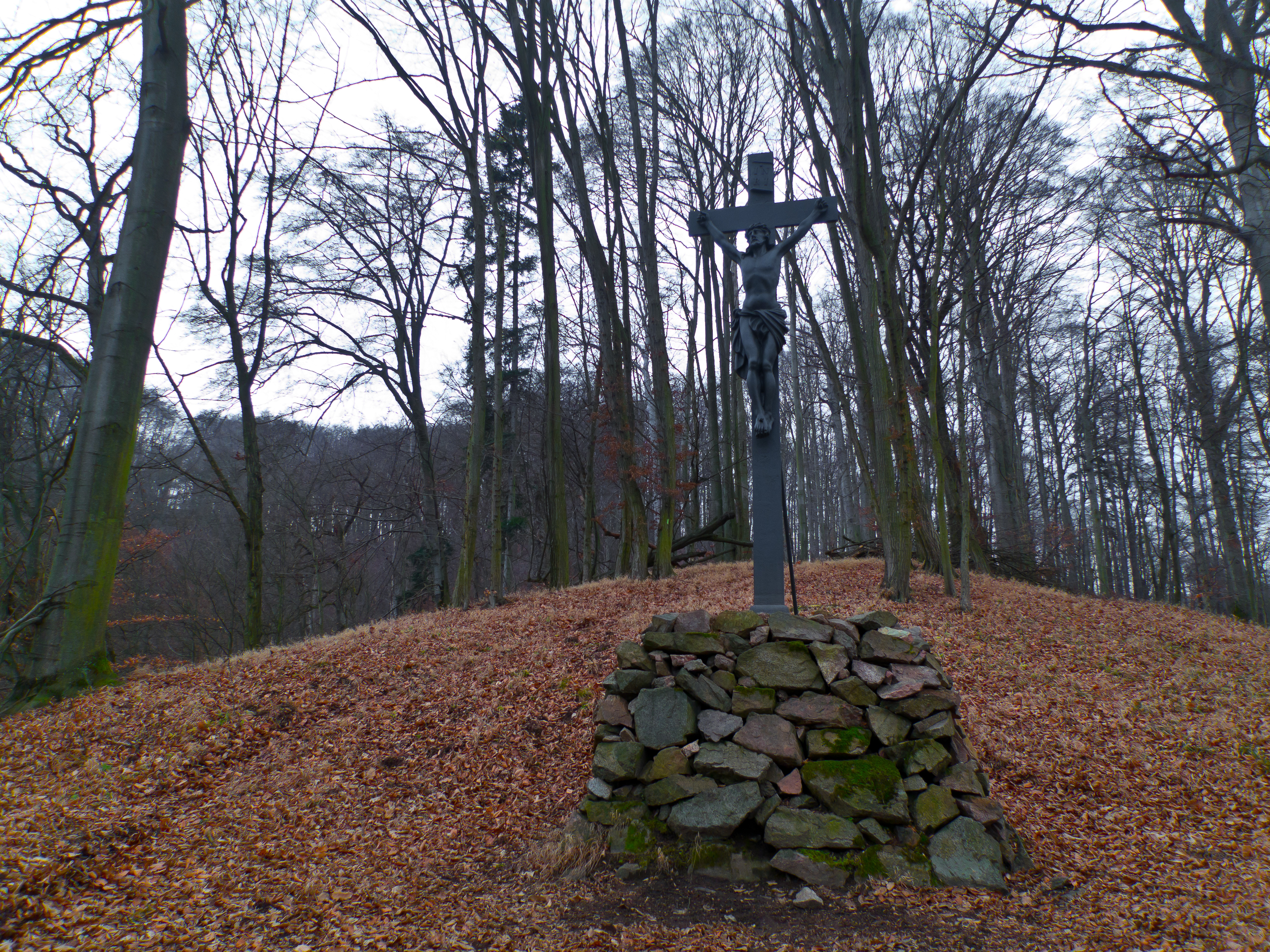 PR Jelení skok